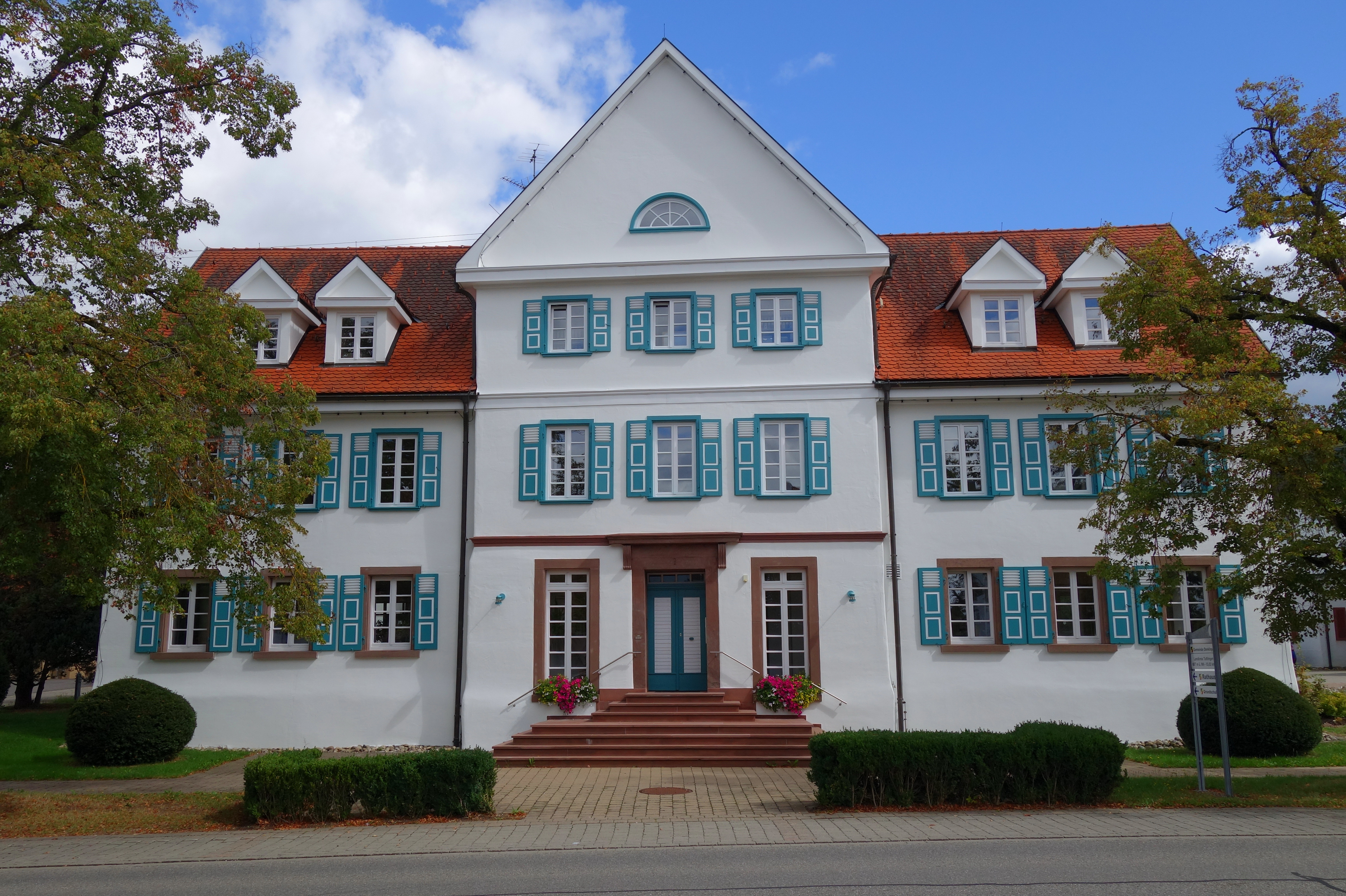 Rathaus in Denkingen, Hauptstraße 46